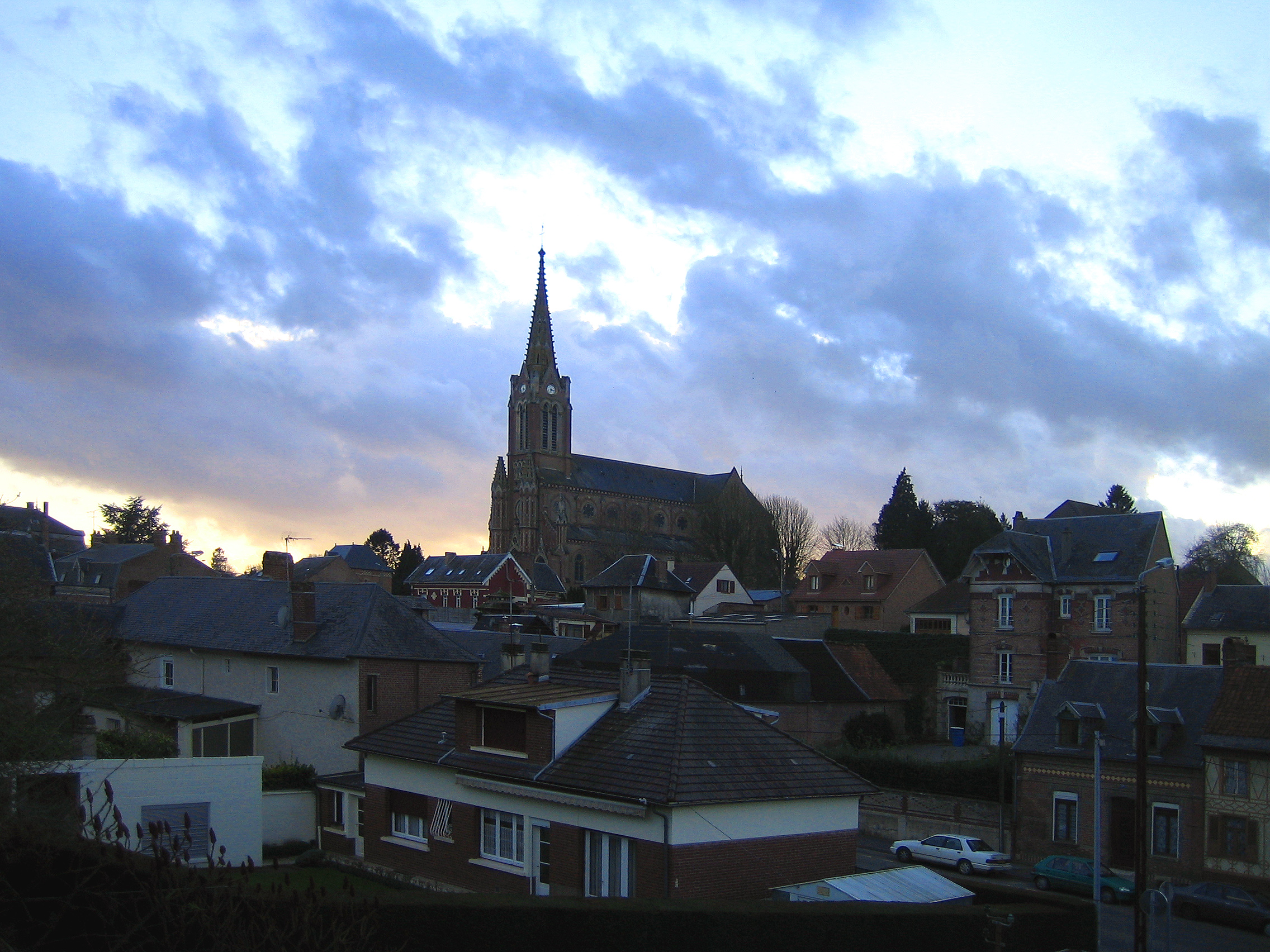 Beauval (Somme, France) - Panorama de la petite ville, avec son église. Vue depuis la Route Nationale 25, à droite (en direction d'Amiens, et en provenance de Doullens).